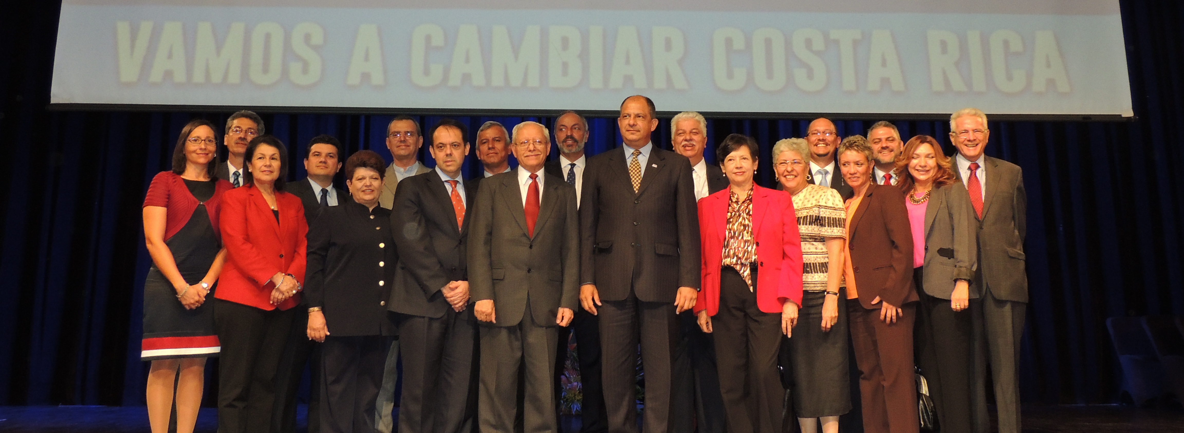 Luis Guillermo Solís presenta su gabinete para el periodo 2014-2018